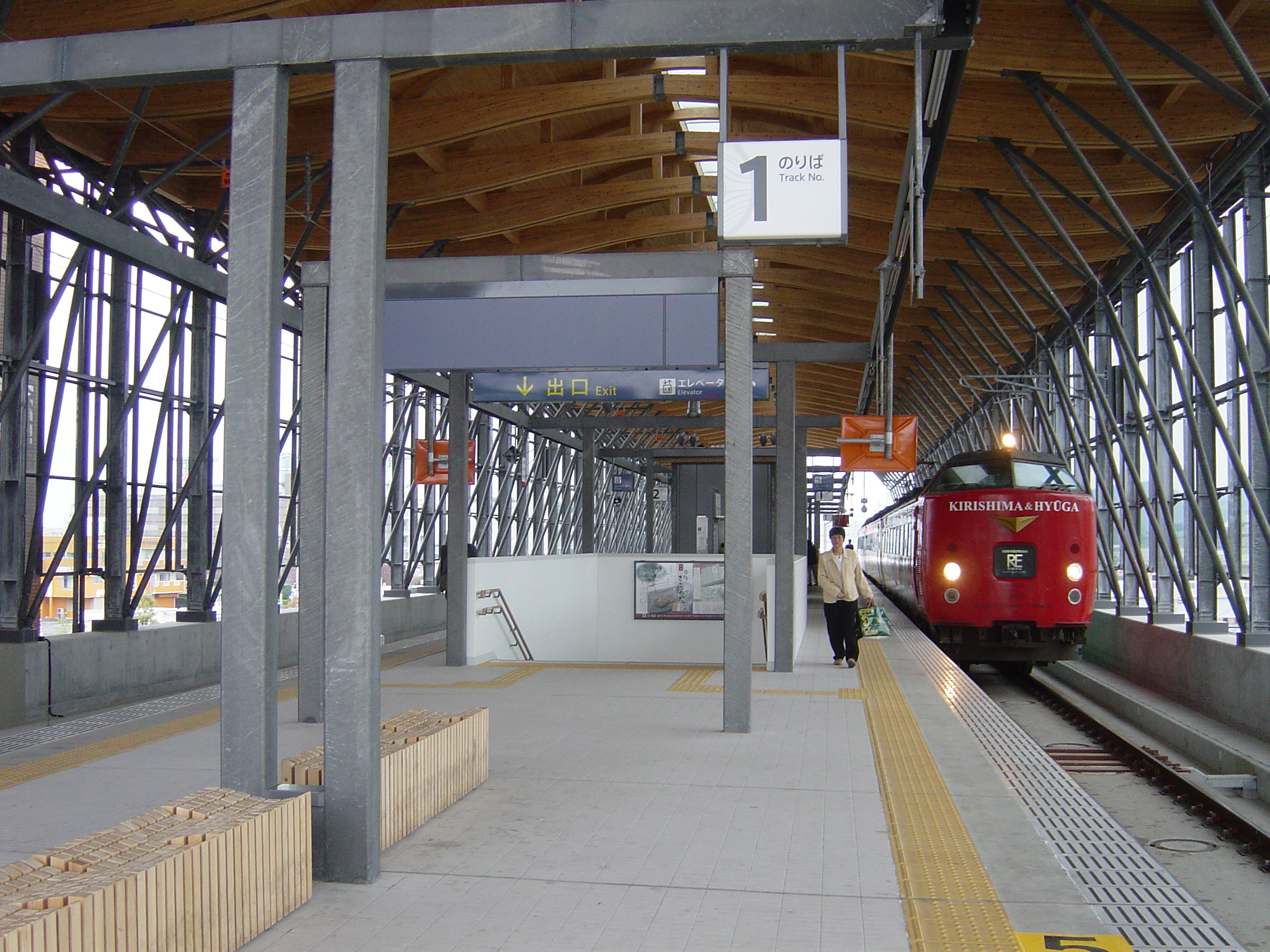 Hyugashi station, Hyuga-shi, Miyazaki, Japan